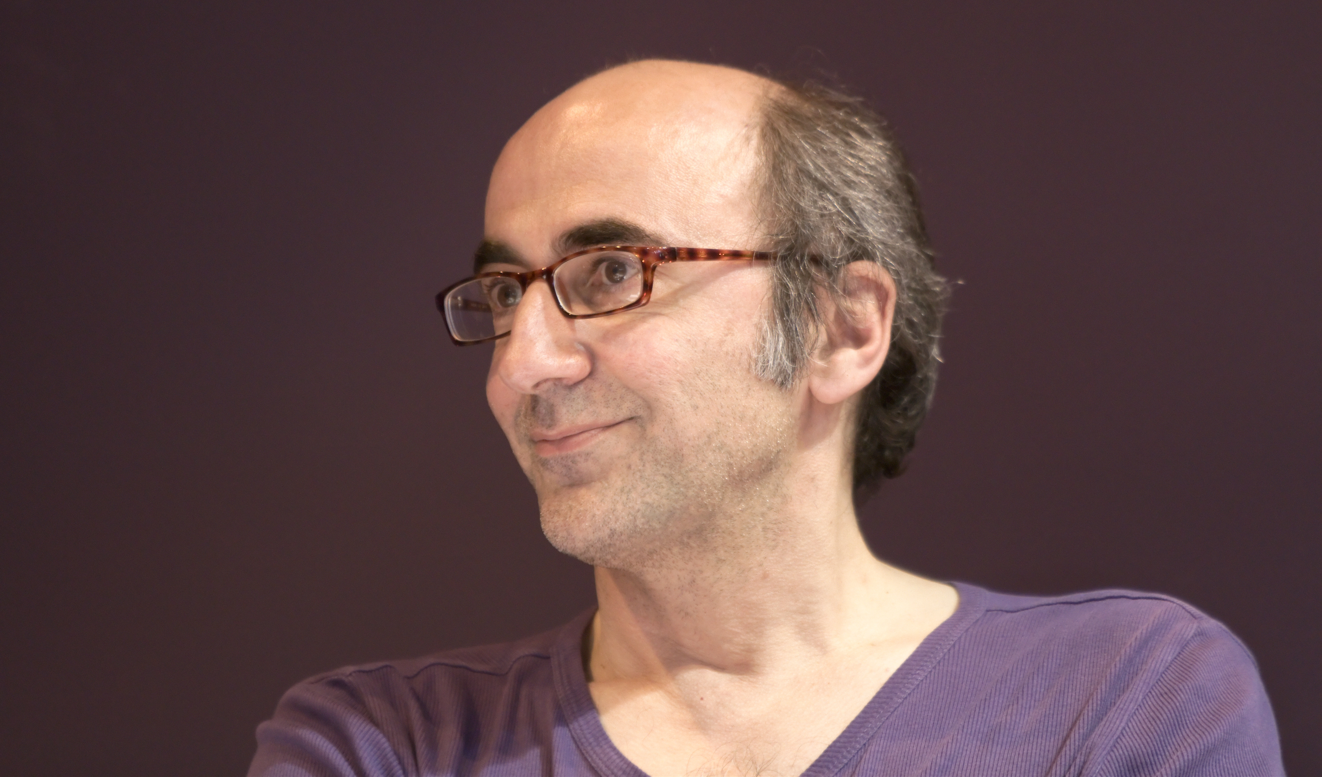 Dominique Fabre au Salon du livre de Paris lors d'une table ronde sur les territoires littéraires : ville, banlieue et ultramoderne solitude.